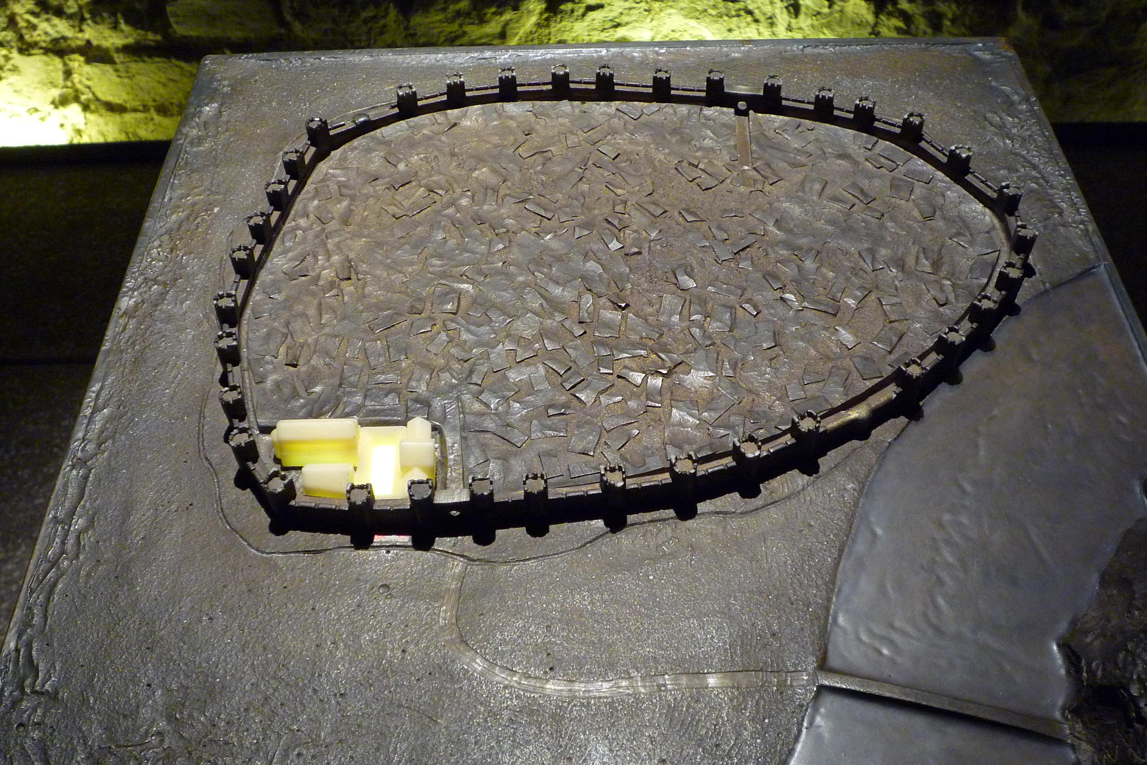 Rempart romain de Gratianopolis (Grenoble) avec le groupe évêché-cathédrale.